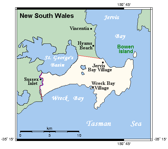 Carte de la baie de Jervis